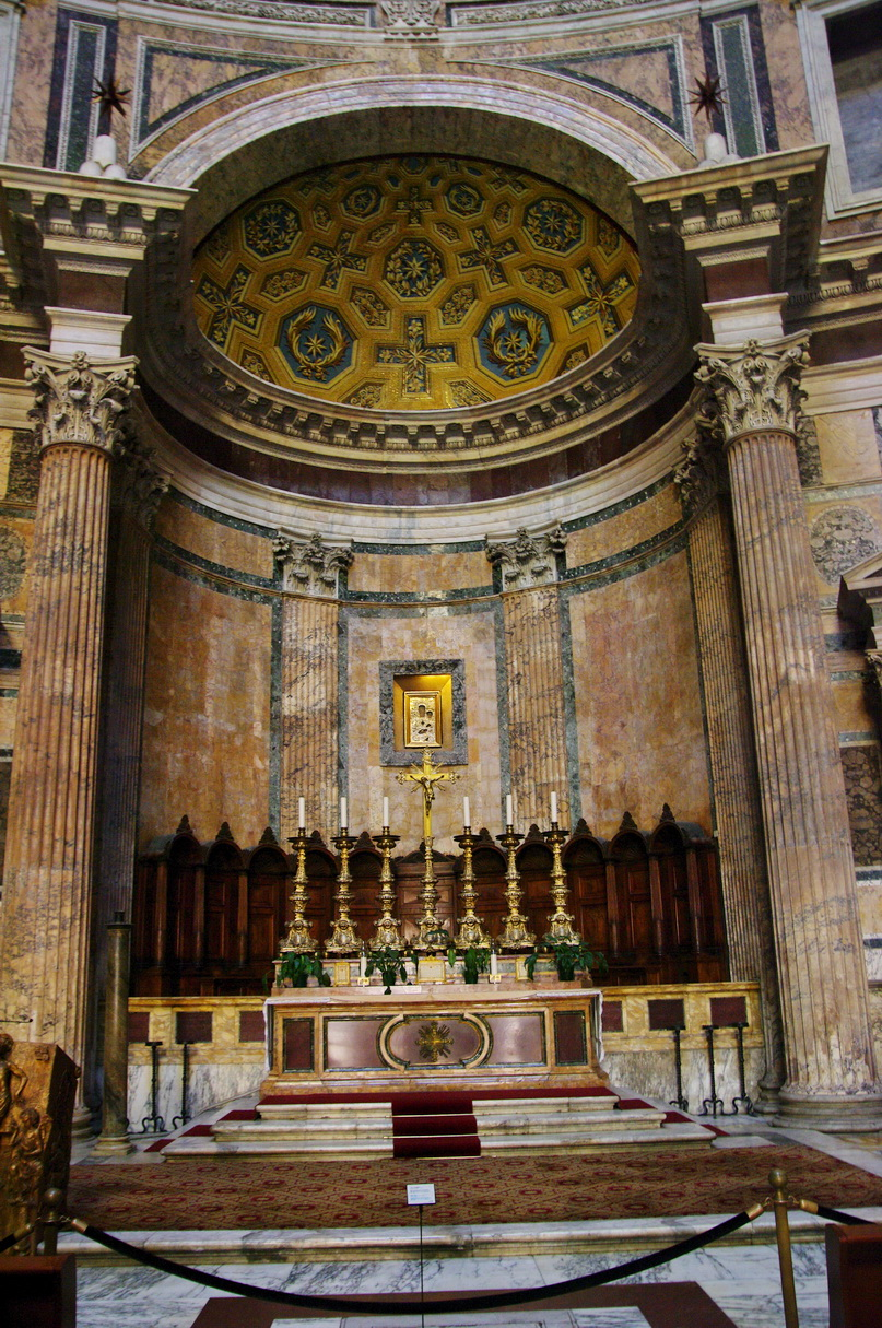 Altar im Pantheon, Rom